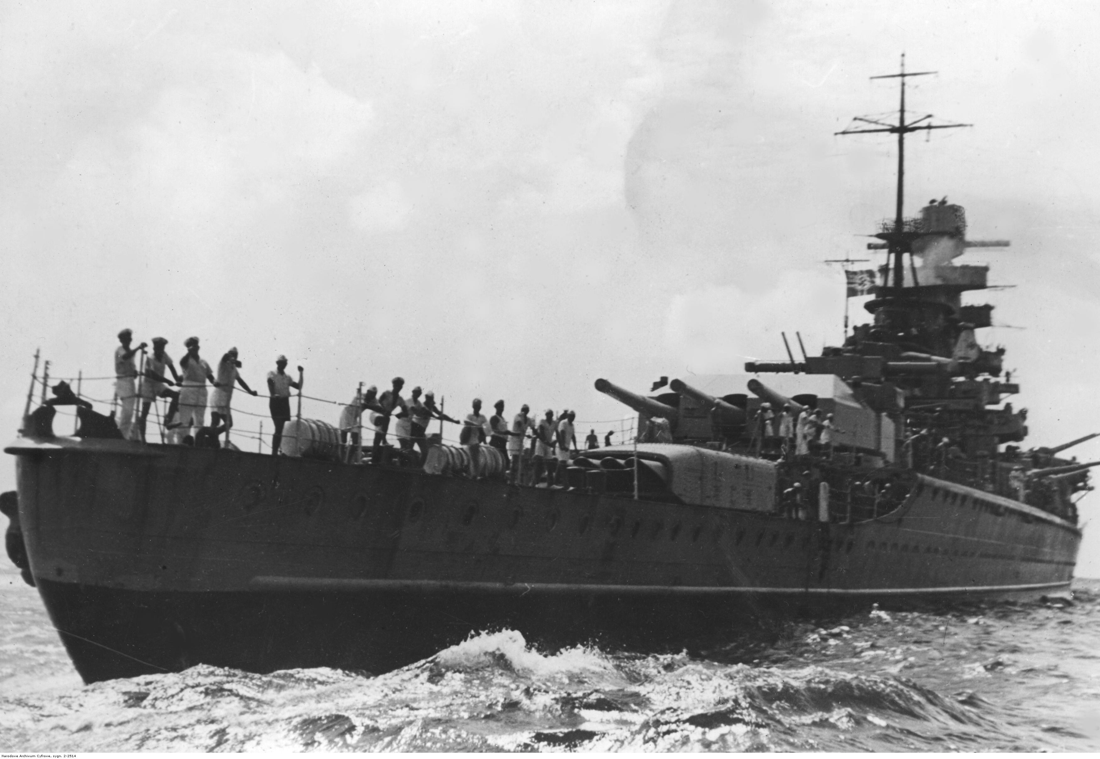 Ciężki krążownik niemiecki "Admirał Sheer". Widoczni marynarze na pokładzie okrętu.